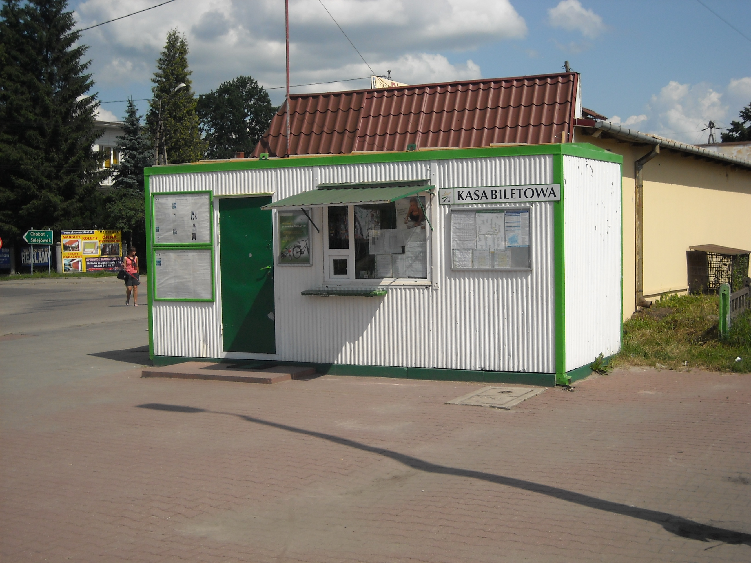 Przystanek osobowy Halinów, kasa biletowa.